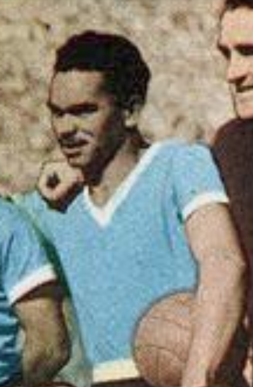 Matías González en la Copa del Mundo de 1950